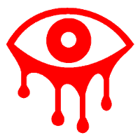 Logotipo de RedEye